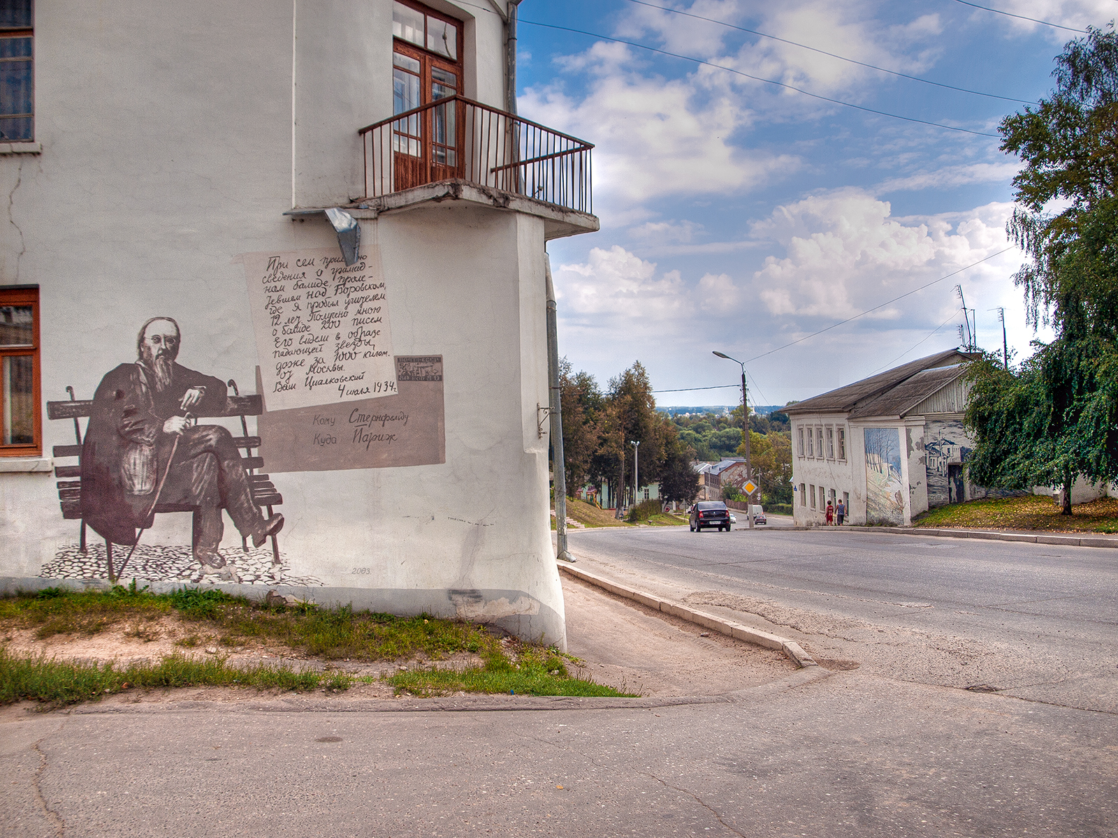 Автор фресок — художник Владимир Овчинников